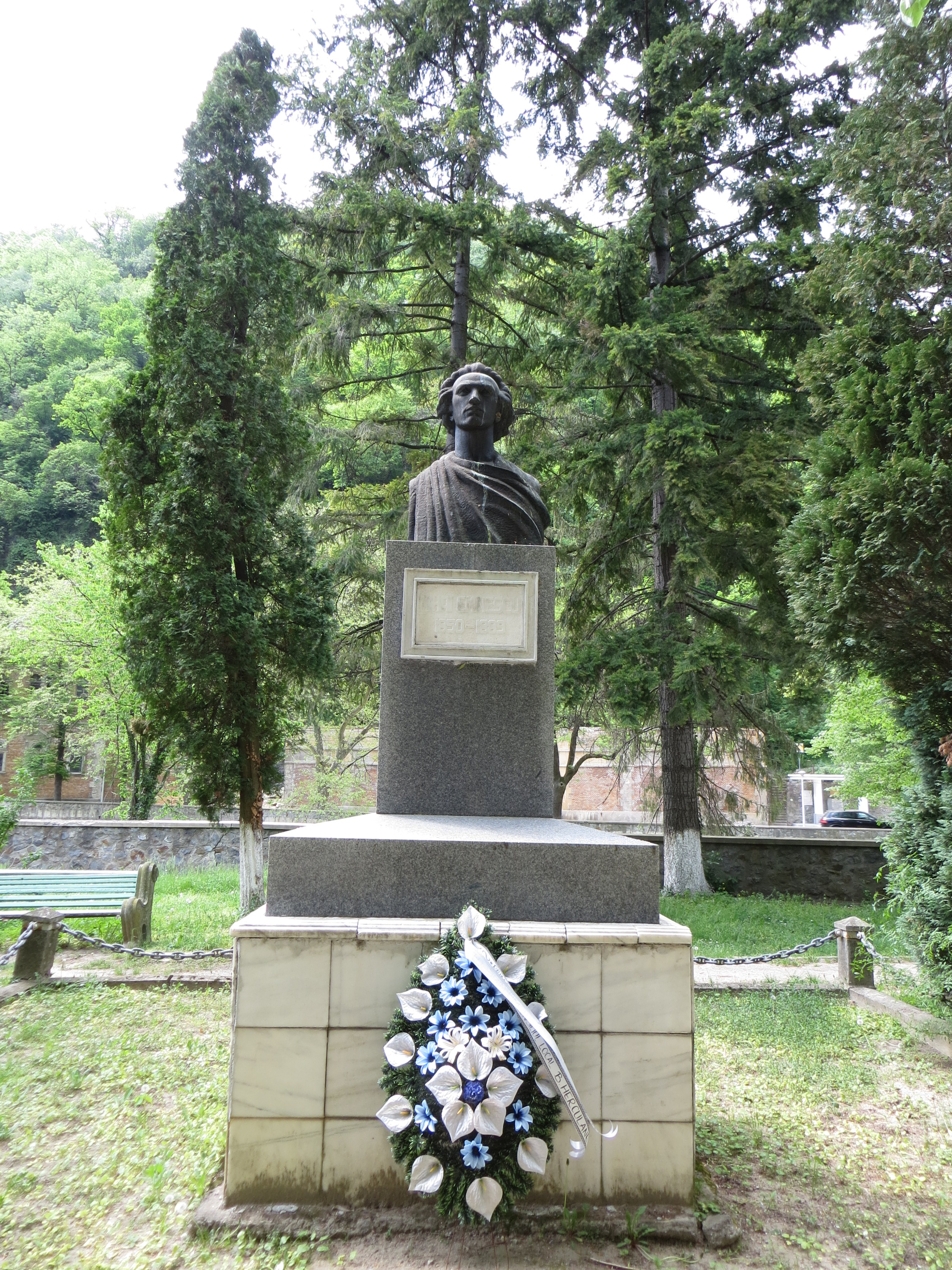 Bustul lui Mihai Eminescu